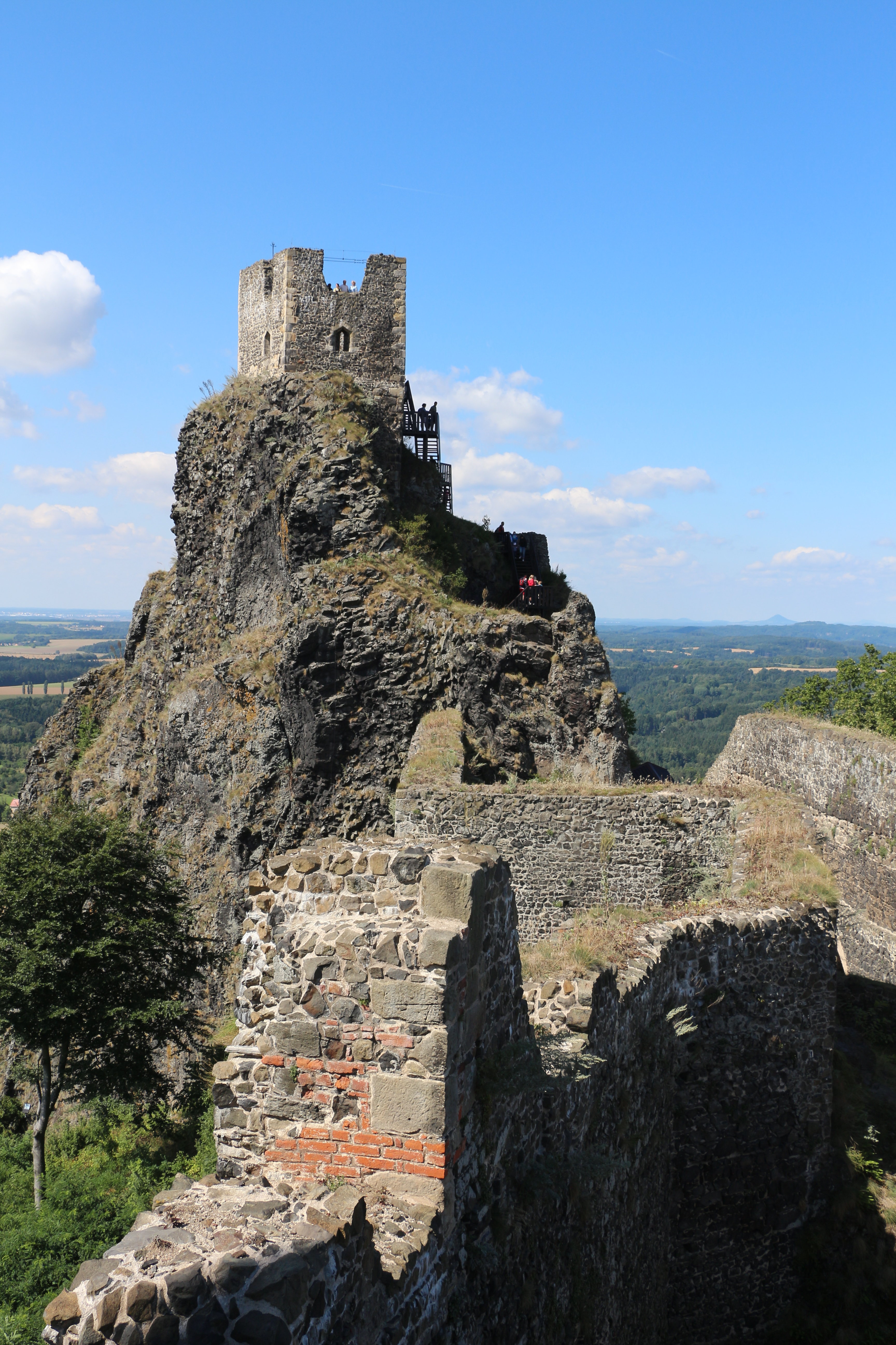 Hrad Trosky, Troskovice.